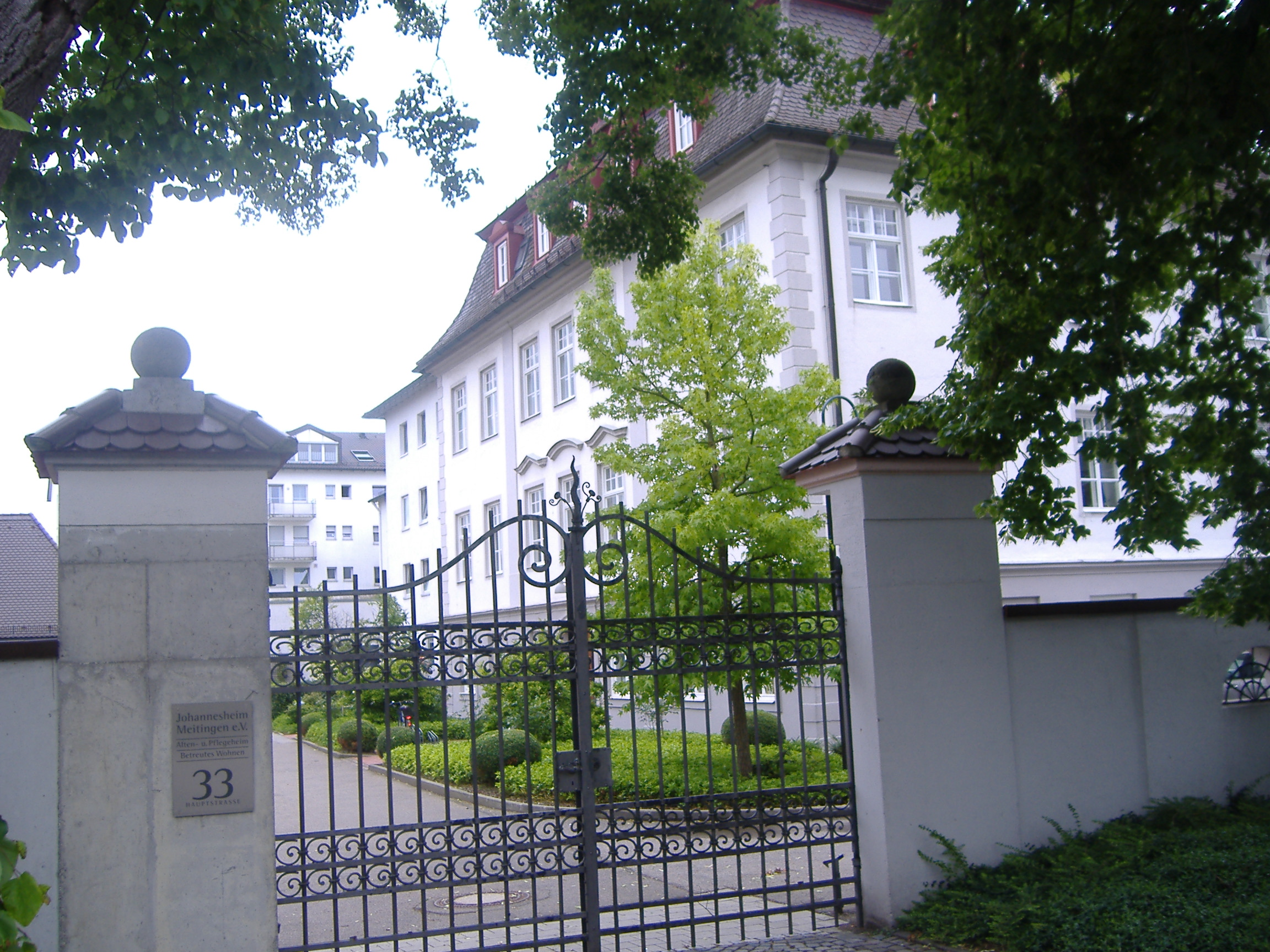 Alten- und Pflegeheim Schloss Meitingen